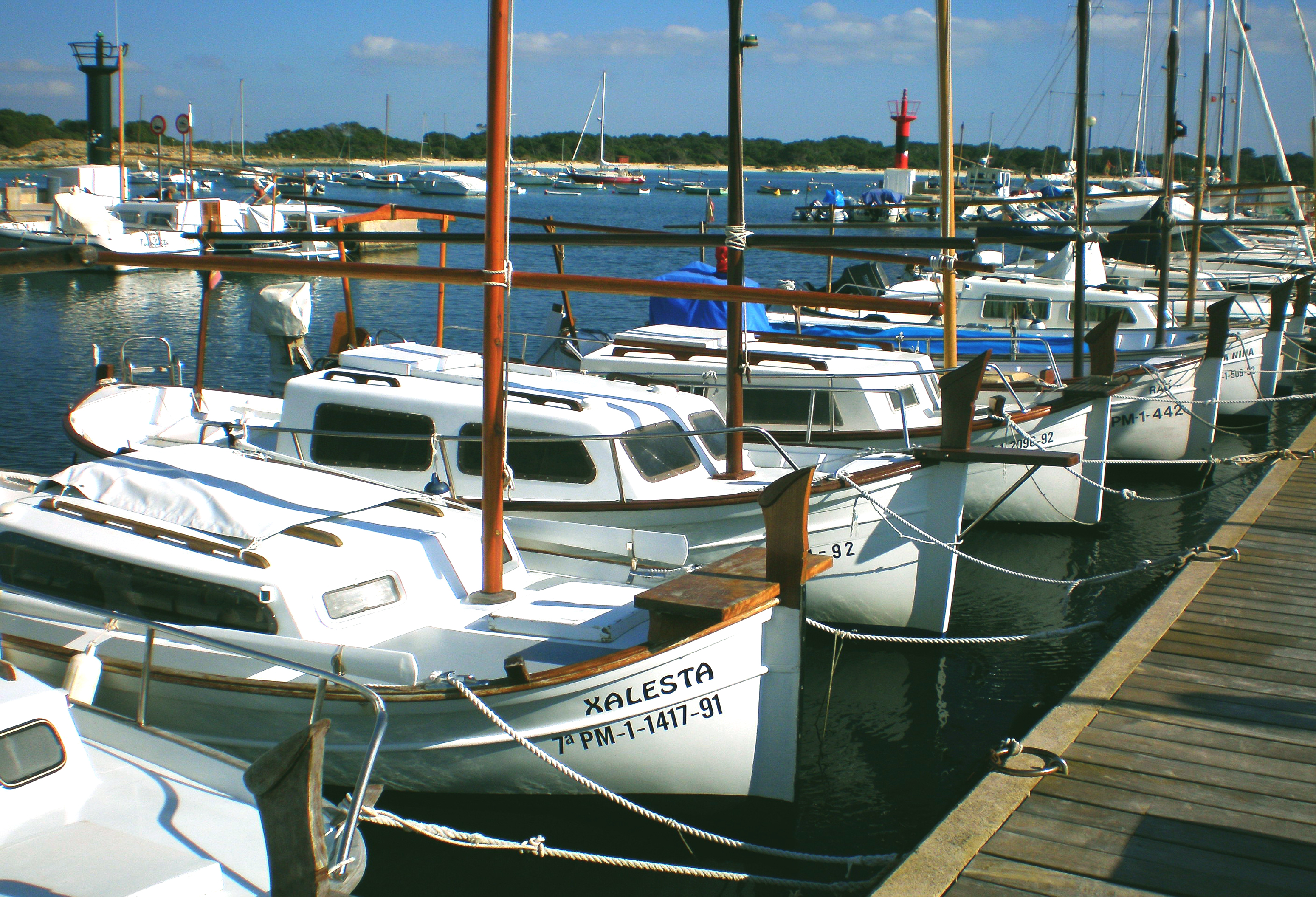 Isla de Mallorca - Barcas en el puerto de Colonia Sant Jordi